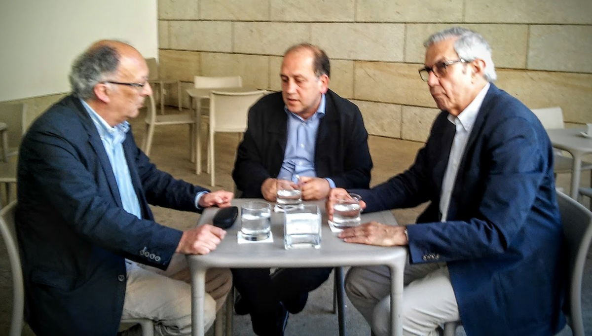 Laxe, Leiceaga e Touriño, nunha xuntanza en Santiago no 2016.